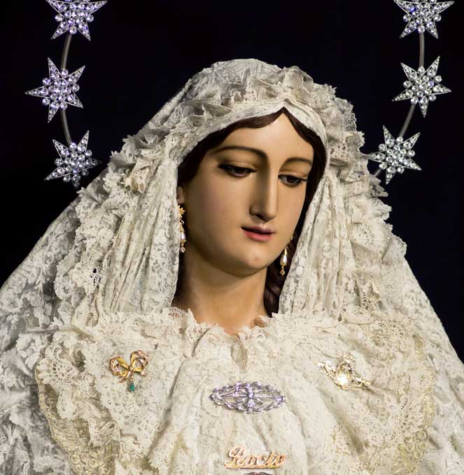 Fotografía de la Virgen del Rocío, conocida como la Novia de Málaga, obra de Pío Mollar.